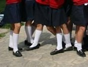 Uniforme escolar para chicas de primaria.